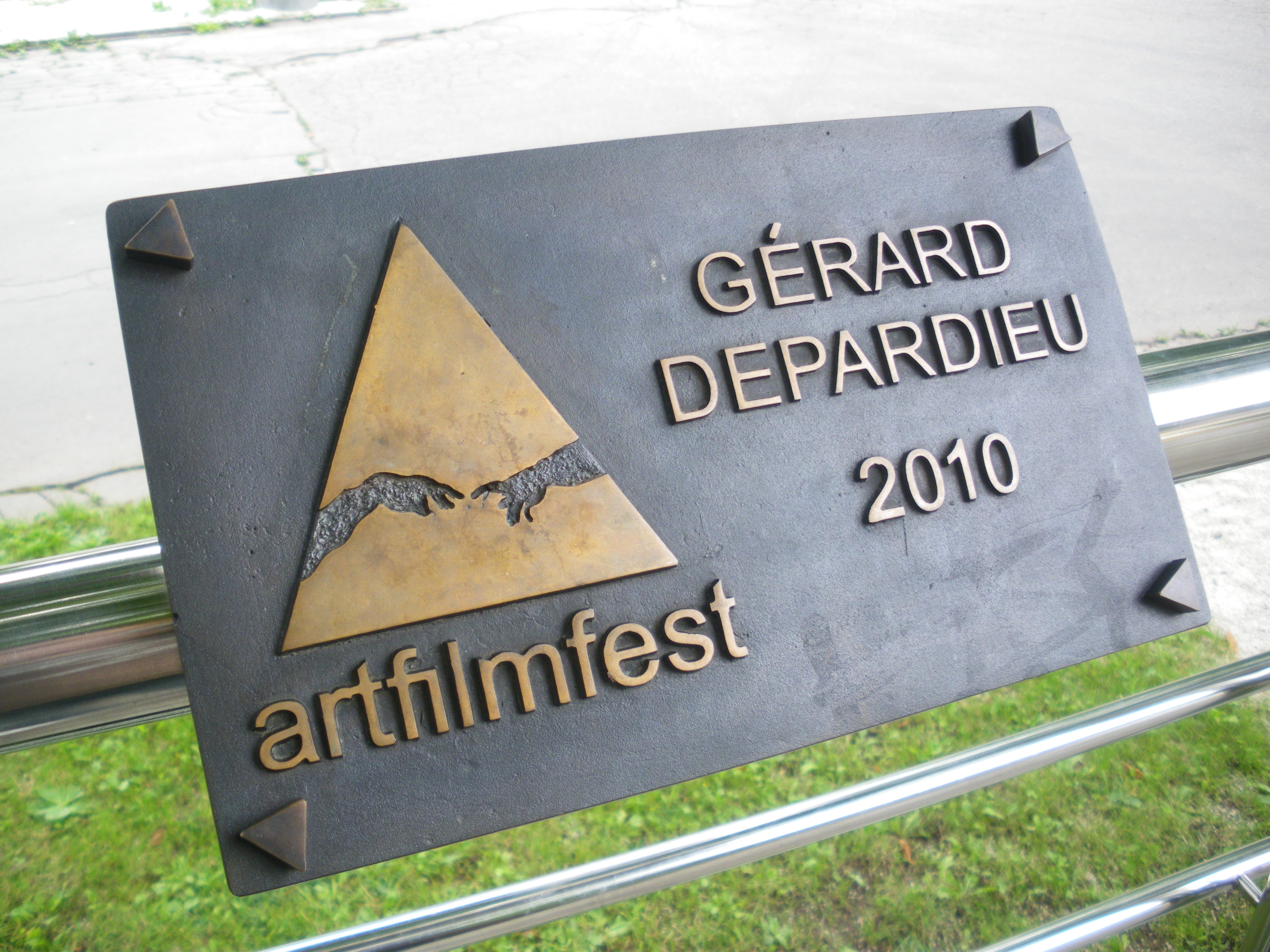 Mosadzná plaketa: „HERCOVA MISIA“ (Actor‘s Mission Award). Medzinárodný filmový festival Art Film Fest, Trenčianske Teplice 2010.